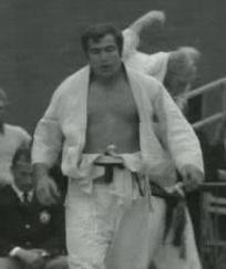 Givi_Onashvili